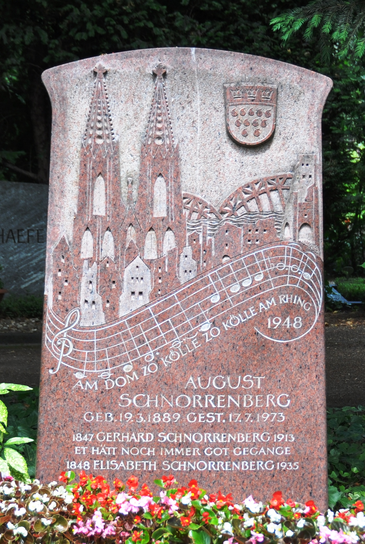 Grabstein von August Schnorrenberg auf dem Melaten-Friedhof in Köln (1889-1973). Das Todesdatum "17.7.1973" ist falsch, er start abm 11.7.1973.